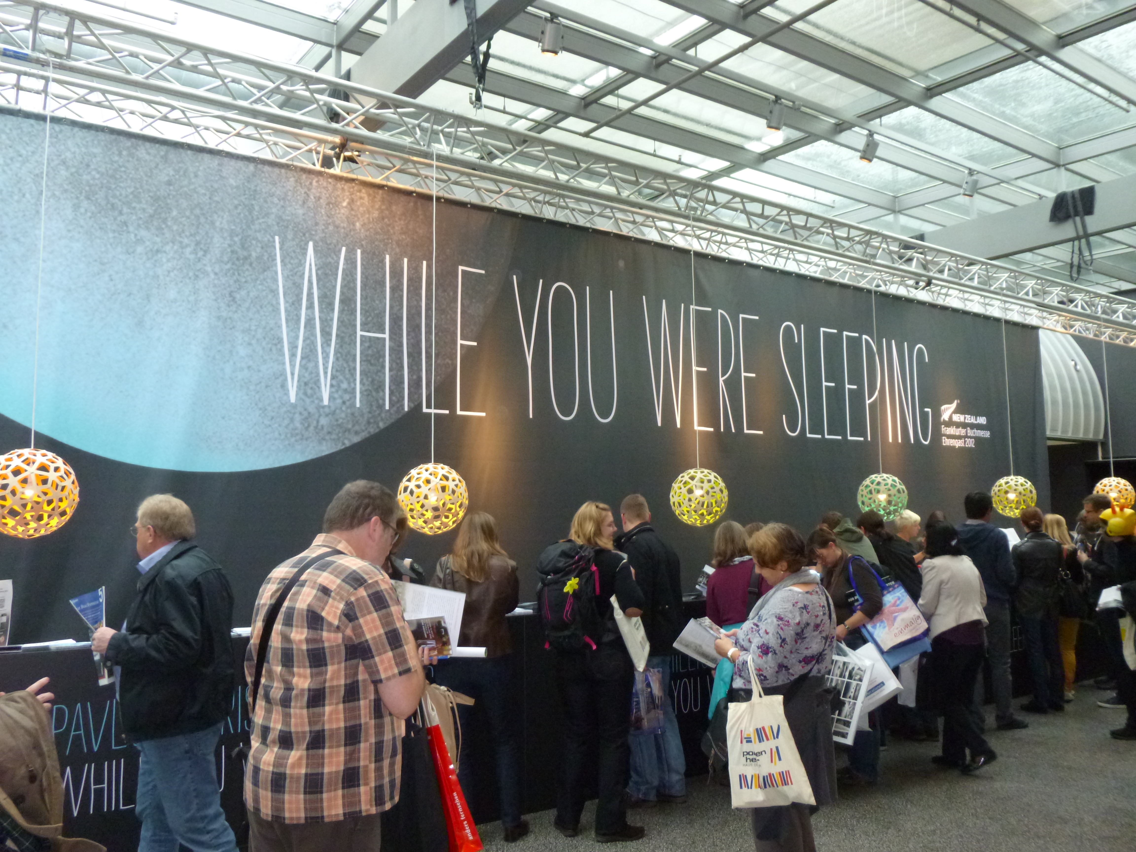 gastlando Novzelando en la Frankfurta librofoiro 2012